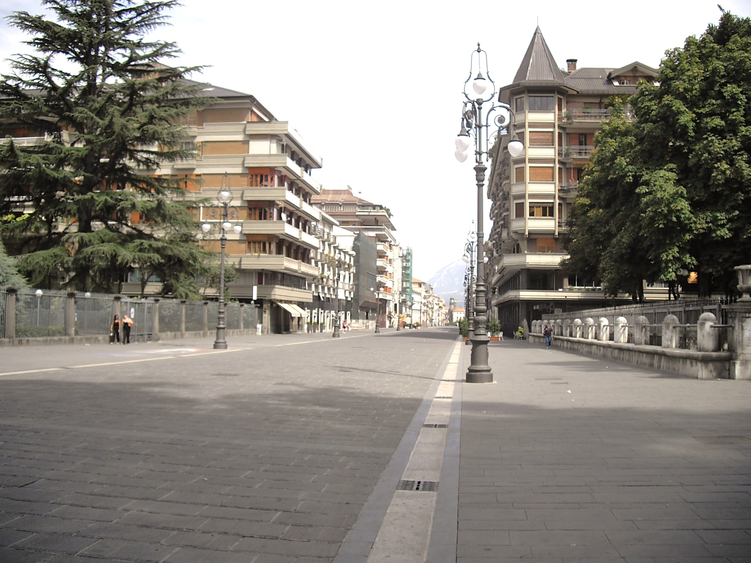 Corso Vittorio Emanuele Avellino